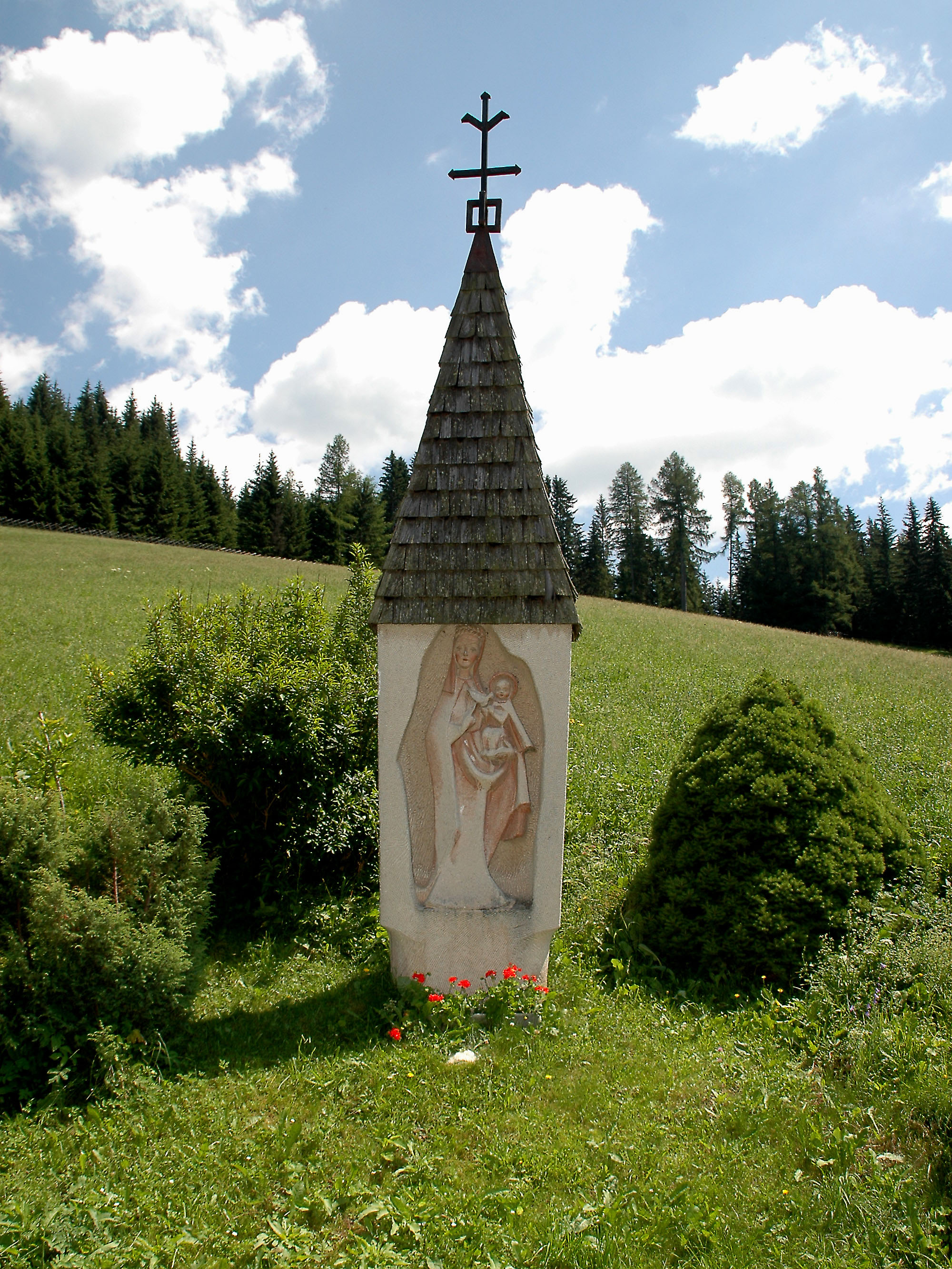 Moarbildstock in Kleinprethal Besitzer: Familie Zöhrer vlg. Moar in Kleinprethal 13 Dieser vom Bildhauer Alfred Schlosser aus der Weststeiermark gefertigte Bildstock wurde im Jahre 1967 aufgestellt